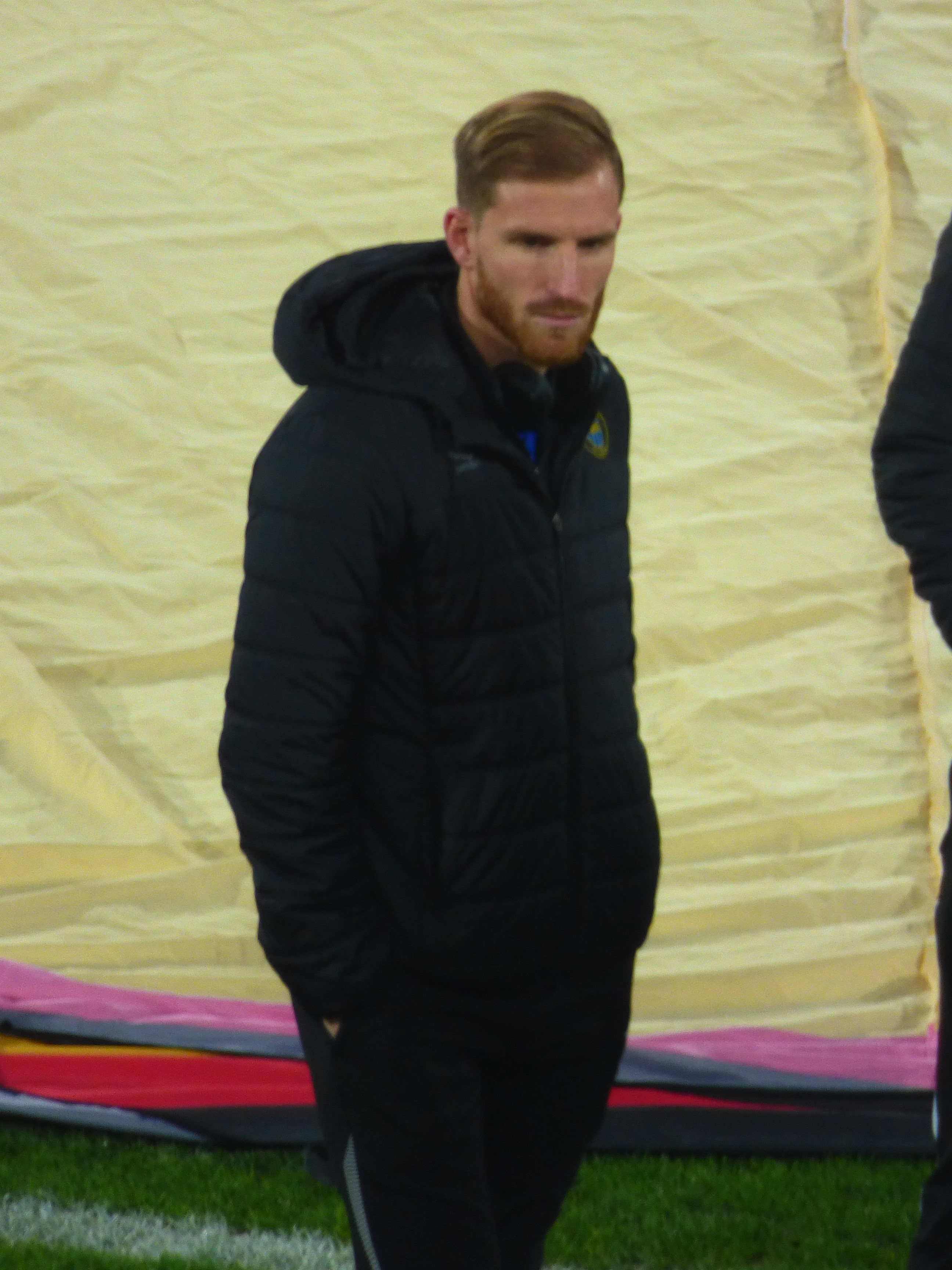 Judicaël Crillon avant le match Lens - Chambly, comptant pour la dix-septième journée du championnat de France de football de Ligue 2 2019-2020, le 3 décembre 2019.